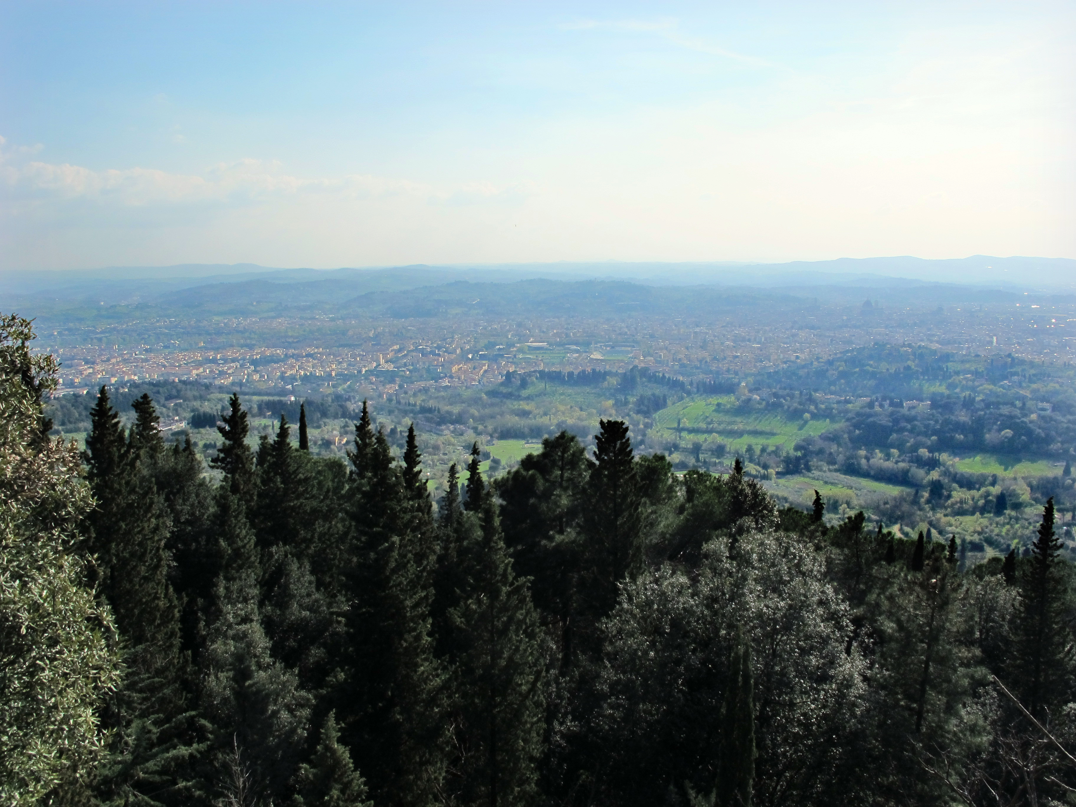 Fiesole